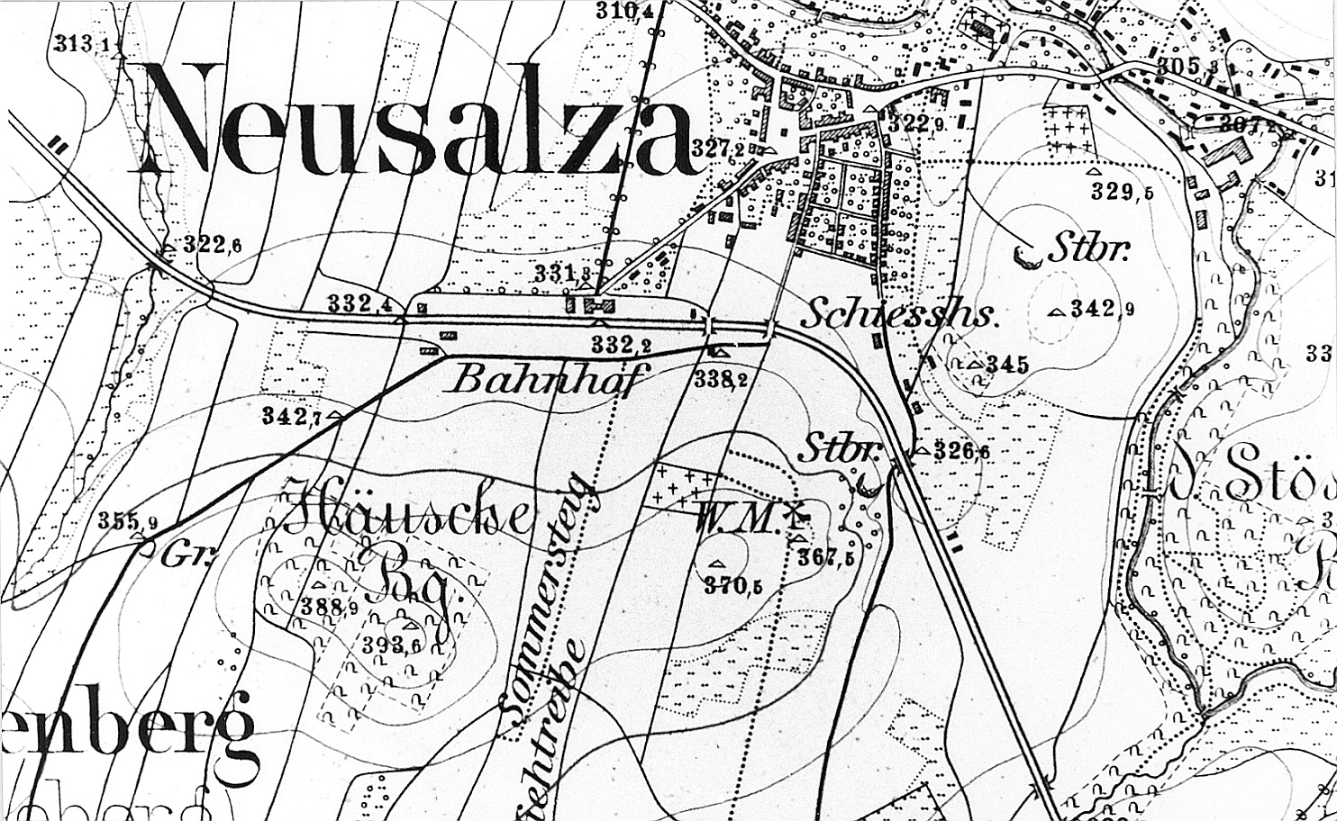 Original image description from the Deutsche Fotothek Neusalza-Spremberg. Meßtischblatt, Sekt. Neusalza, 1883